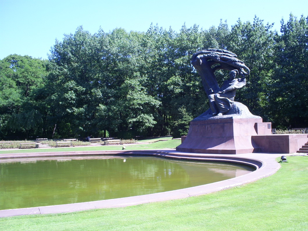 Шопенов споменик у варшавском парку Лазиенки (Пољска) 27.07.2006. Author:Jovan Vuković If you need this picture with biger rezolution ask me there.